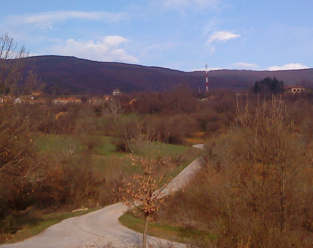 Поглед на село Ѓавато